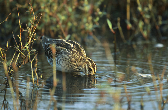 Gallinago gallinago